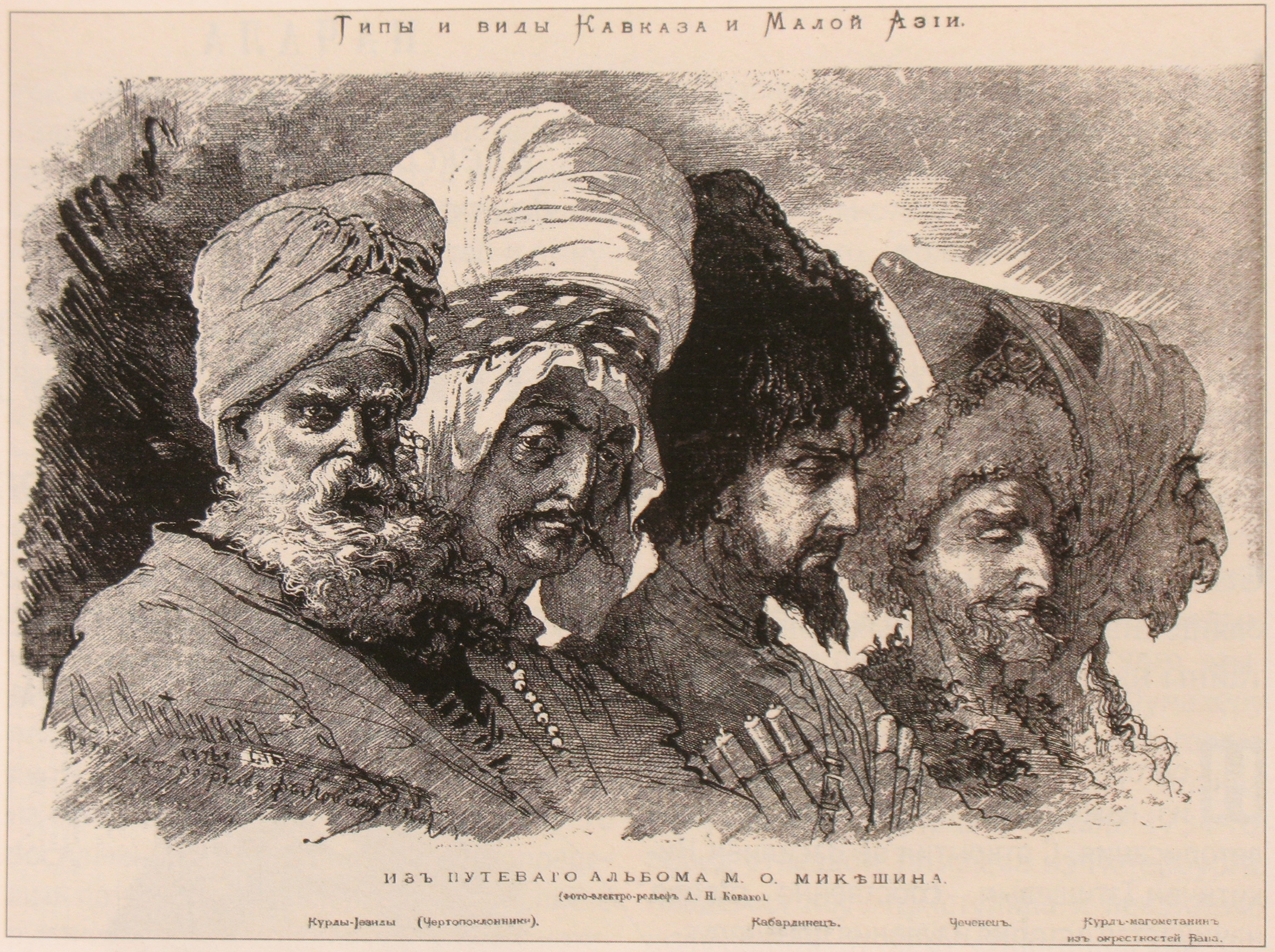 М. Микешин. Типы и виды Кавказа и Малой Азии. Слева направо: два курда-чертопоклонника, кабардинец, чеченец, курд-магометанин из окрестностей Вана. Рисунок 1876 года в оригинальном цвете.